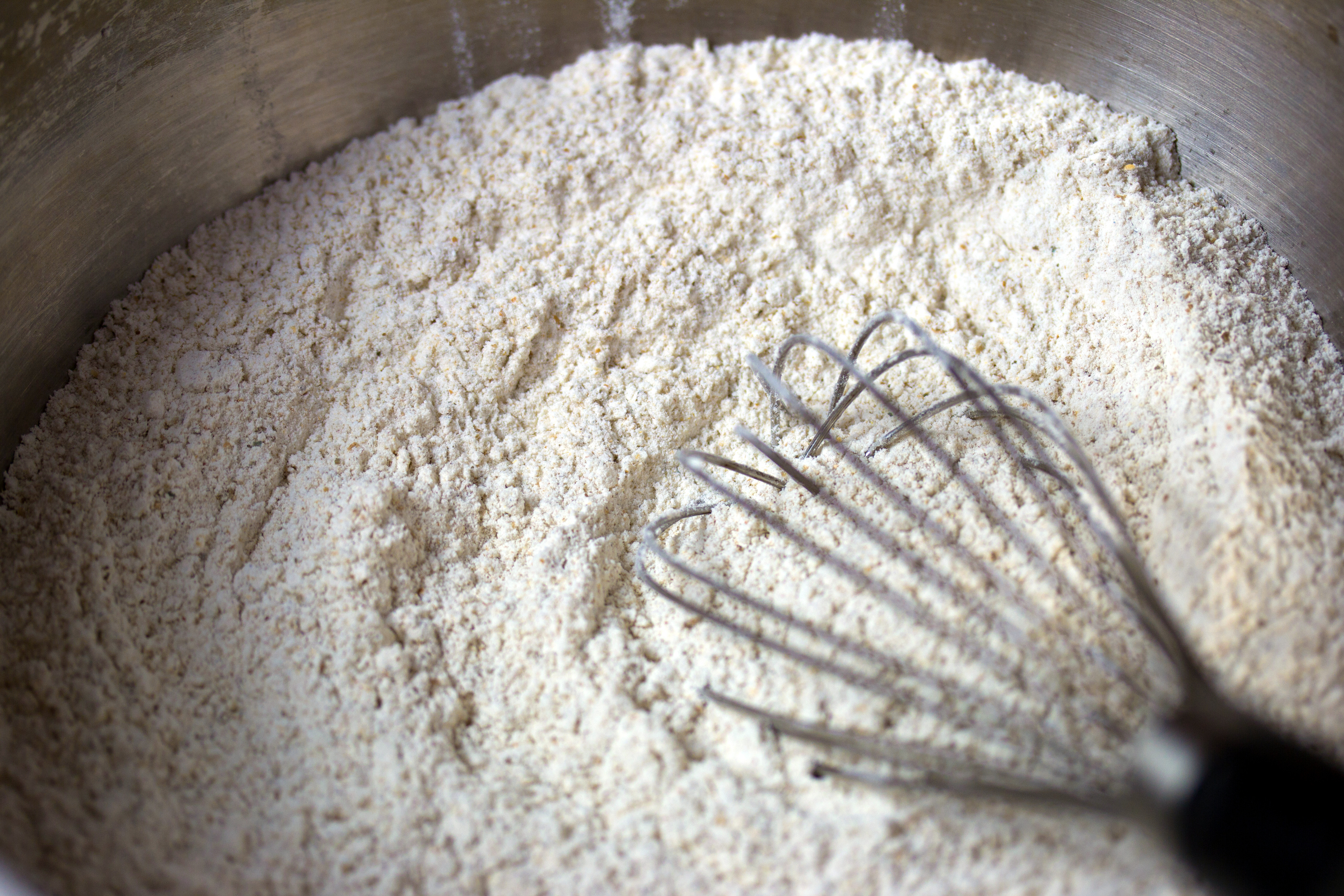 Rye Flour